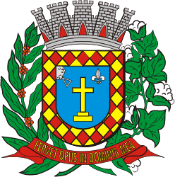 Brasão da cidade de Votuporanga, SP